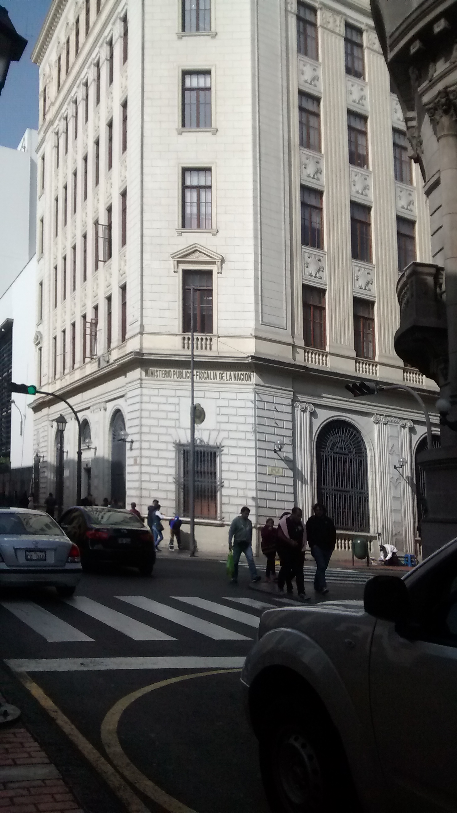 Ubicado en el Centro historico de Lima